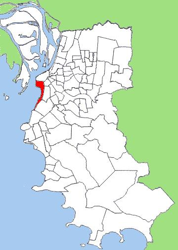 Mapa dos bairros da cidade brasileira de Porto Alegre mostrando o bairro Praia de Belas (em verde escuro).